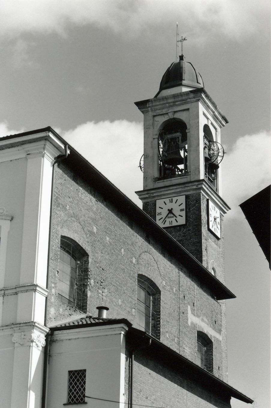 Boffalora sopra Ticino, aprile 2005: il campanile della chiesa di Santa Maria della Neve.